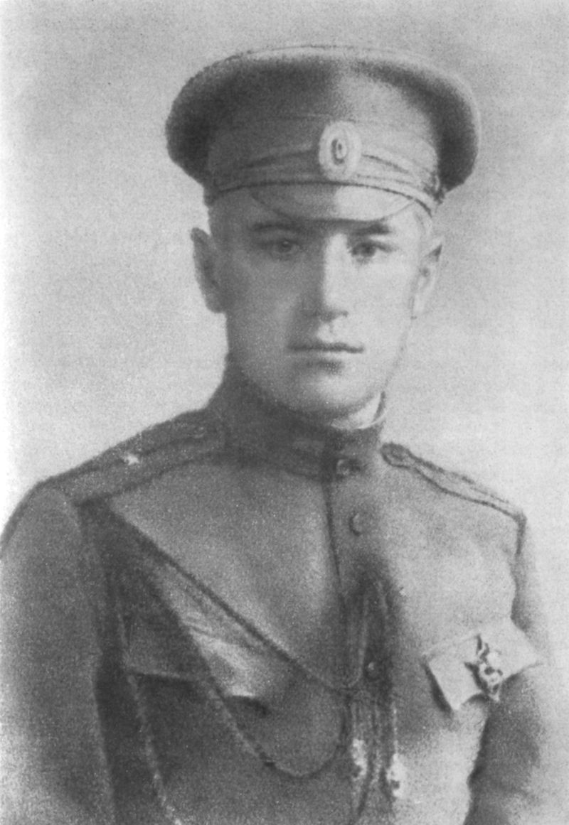 Валентин Катаев. Портрет, опубликованный в журнале «Весь мир», 1916.Valentin Kataev. Portrait published in Ves’ Mir (The World) magazine, 1916.